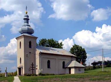 Kostol v Košický Klečenov